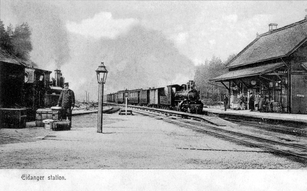 Eidanger stasjon (Her plasseres 170b.jpg) Dette bildet viser Eidanger stasjon rundt 1910. Denne stasjonen ble åpnet i 1882. Eidanger stasjon var i mange år et viktig knutepunkt, for her møttes Breviksbanen og Vestfoldbanen. I dag er stasjonen nedlagt. FOTO: GAMMELT POSTKORT TEKST: PER STIAN B. KJENDAL *** Local Caption *** Eidanger stasjon (Her plasseres 170b.jpg) Dette bildet viser Eidanger stasjon rundt 1910. Denne stasjonen ble åpnet i 1882. Eidanger stasjon var i mange år et viktig knutepunkt, for her møttes Breviksbanen og Vestfoldbanen. I dag er stasjonen nedlagt. FOTO: GAMMELT POSTKORT TEKST: PER STIAN B. KJENDAL